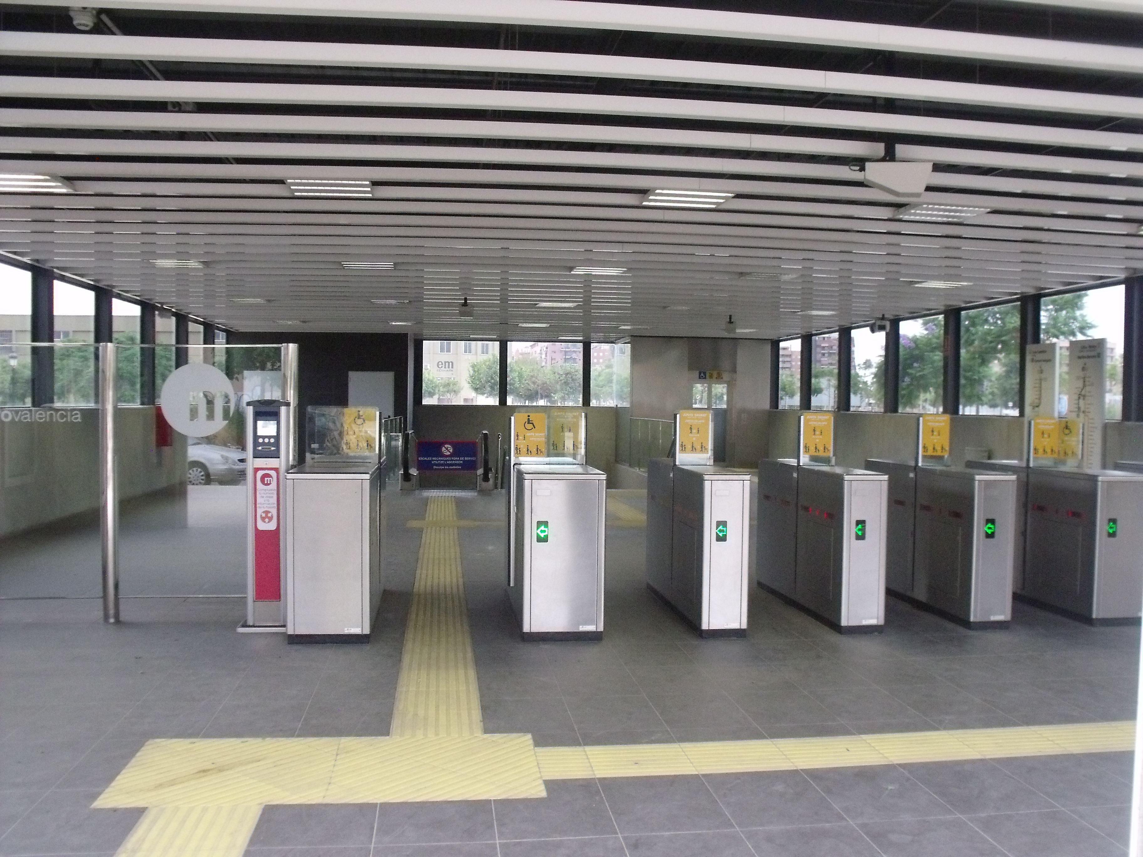 Vestíbulo estación de Safranar